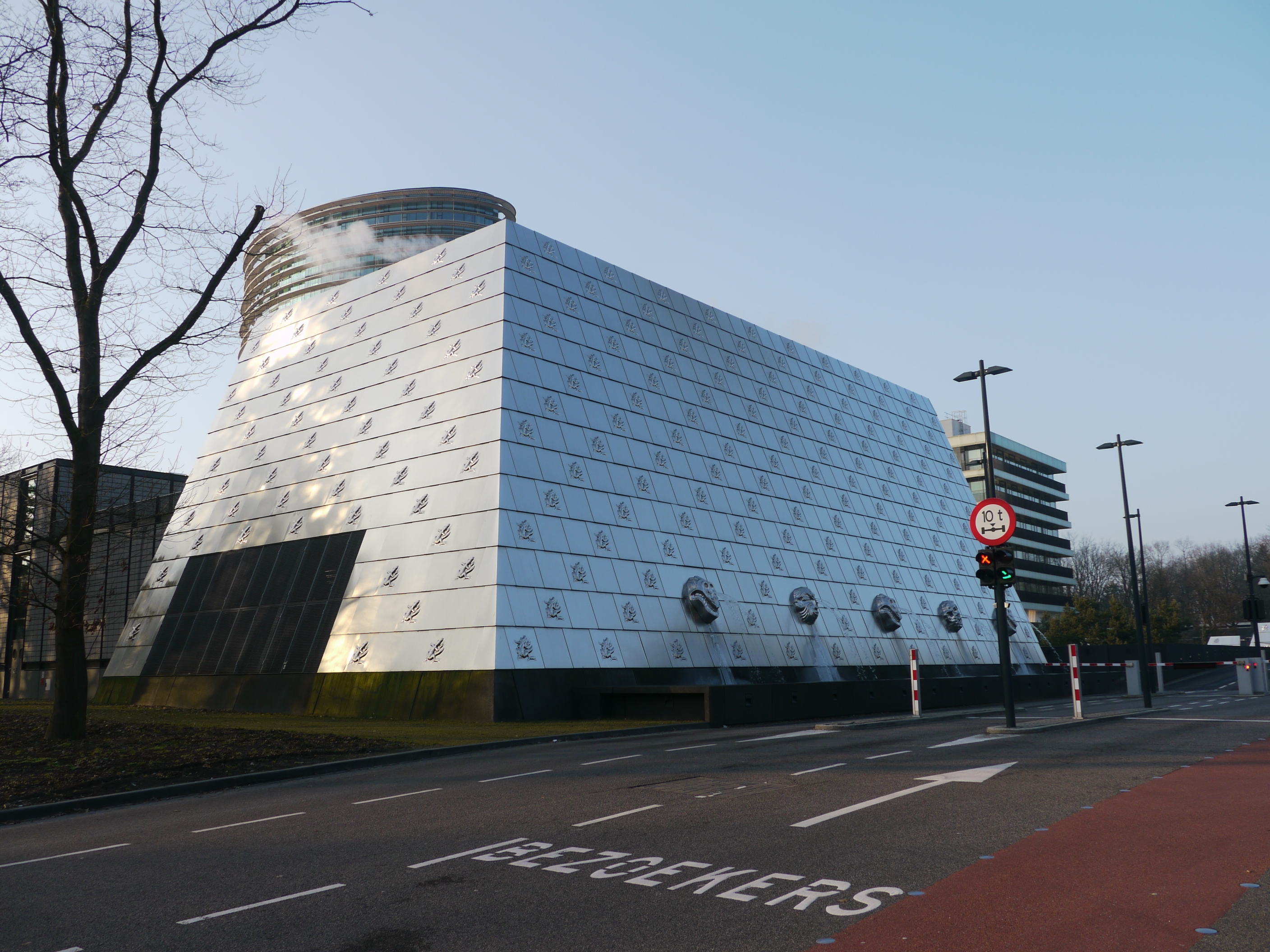 Entree belastingdienst Apeldoorn (foto 01)